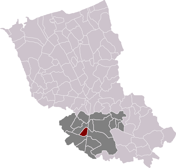 Locatie gemeente Zerkel in arrondissement Duinkerke. Zelfgemaakt. Location of Sercus municipality in the arrondissement of Dunkirk. Self made. Localisation de la commune de Sercus dans l'arrondissement de Dunkerque. Fait moi-même.